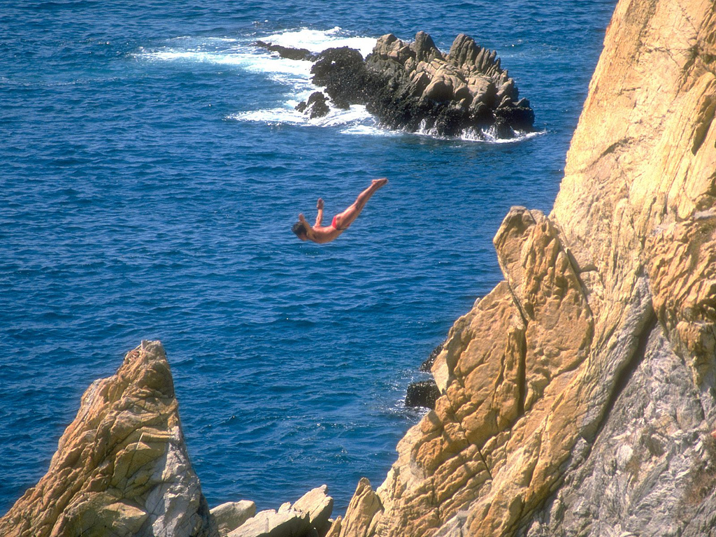 Saltadores de La Quebrada en Acapulco